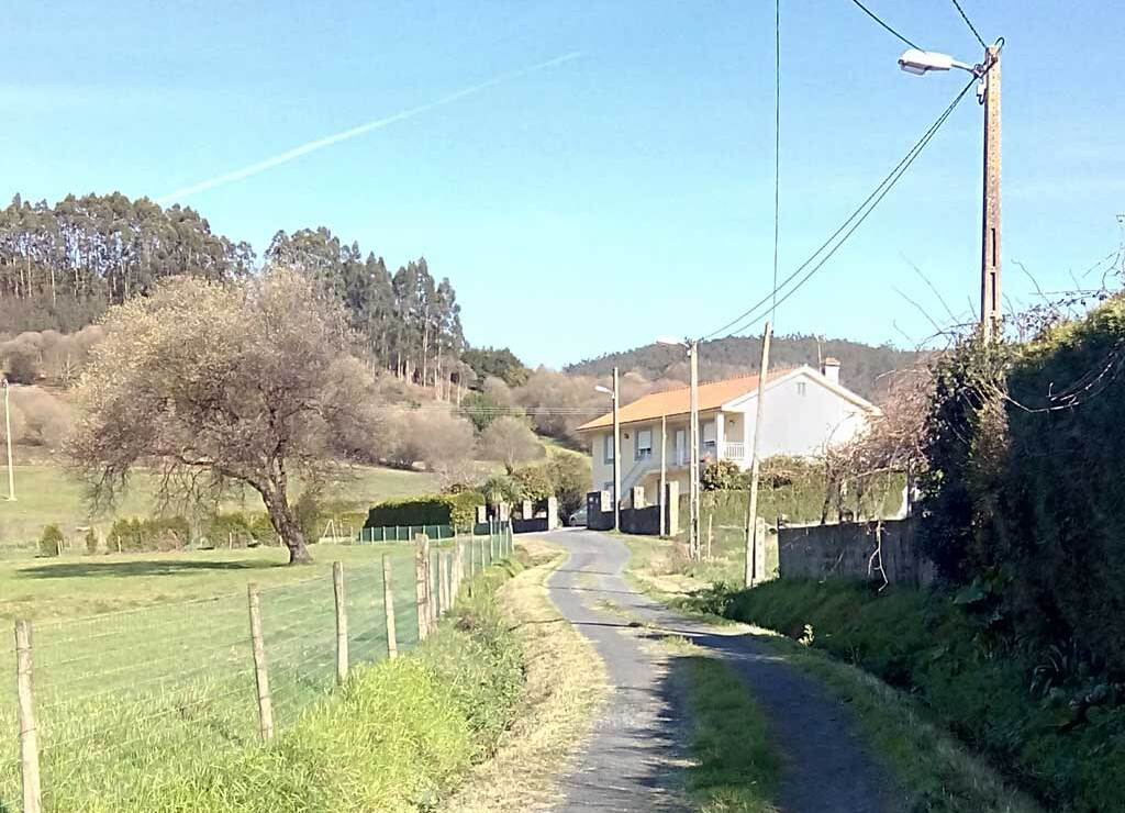 Vista da Borrallada, Sedes.